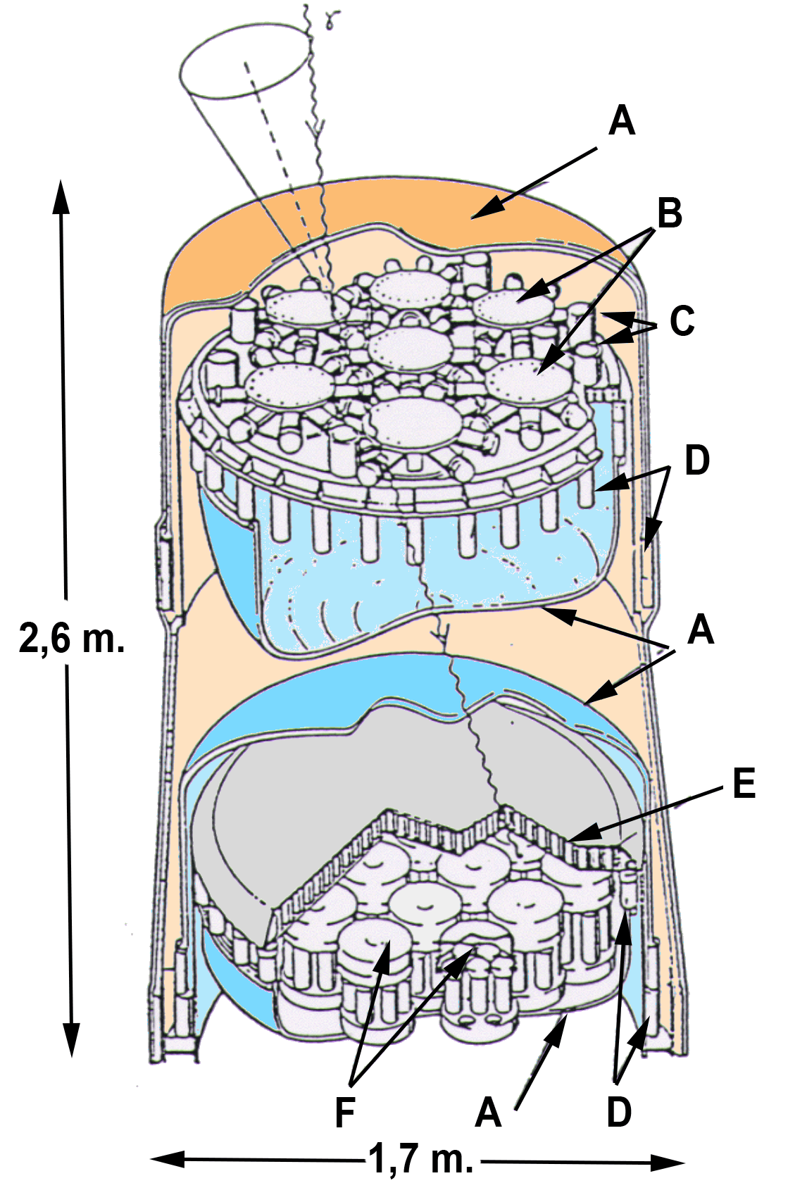 Instrument COMPTEL de l'observatoire Gamma CGRO de la NASA.